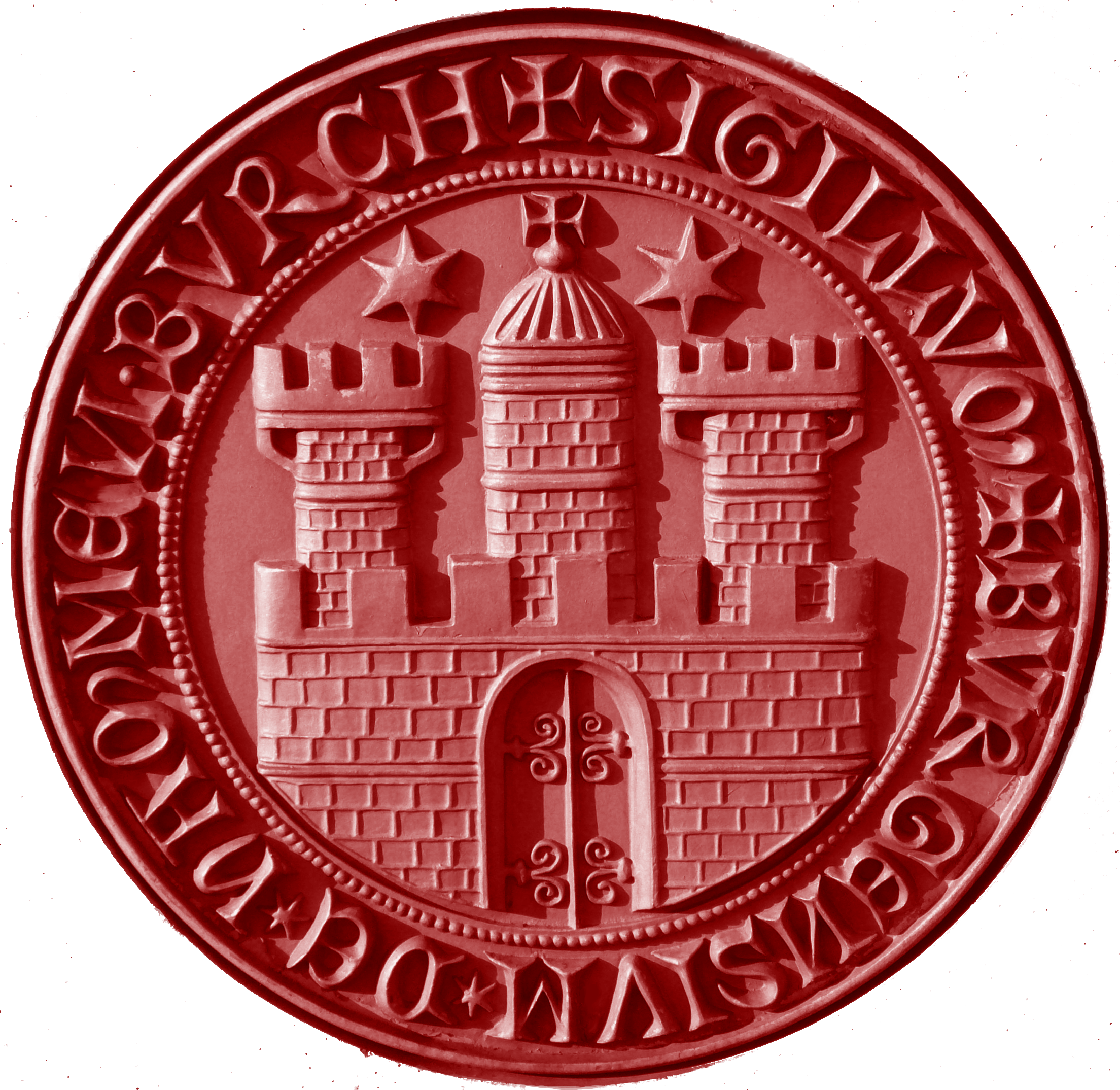 großes Staatssiegel von Hamburg, bearbeitet nach dem Relief vor dem Staatsarchiv - freigestellt, gerichtet, eingefärbt